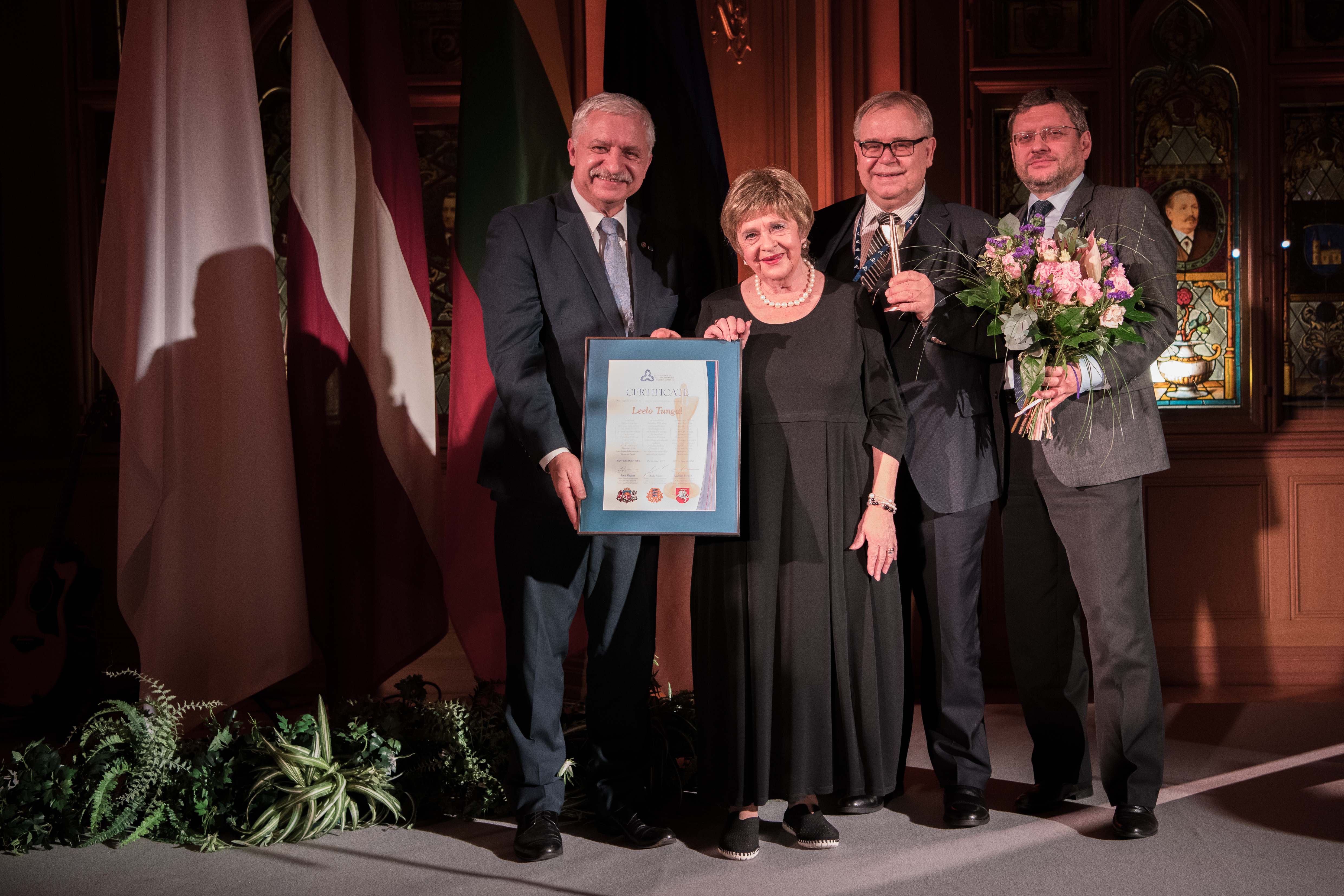 2019.gada 28.novembris. Baltijas Asamblejas balvu literatūrā saņem rakstniece Lēlo Tungala (Leelo Tungal). Foto: Ieva Ābele, Saeima Izmantošanas noteikumi: saeima.lv/lv/autortiesibas